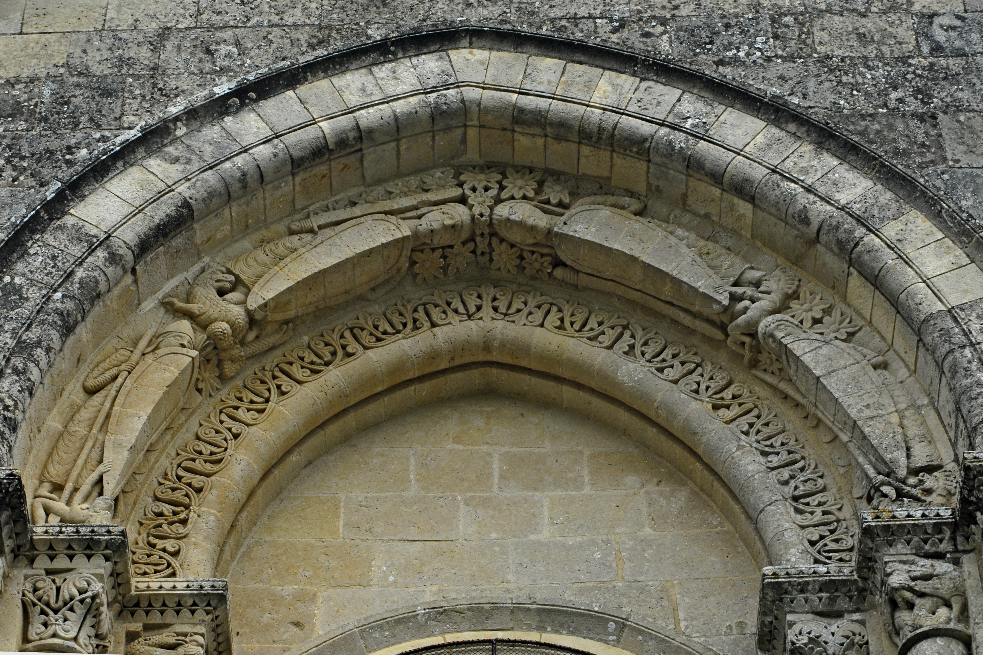 St.-Pierre Aulnay, Archivoltenfenster über Südportal